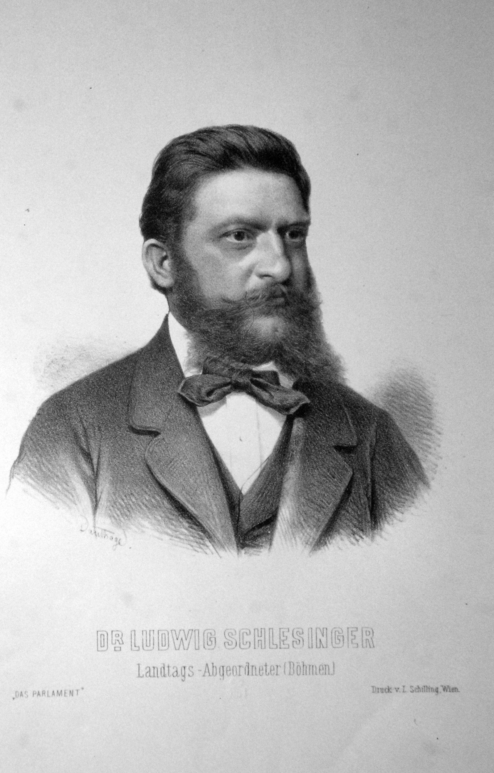 Dr. Ludwig Schlesinger (1838-1899), Historiker, Landtags- und Reichsratabgeordneter für Böhmen. Lithographie von Adolf Dauthage, ca. 1880